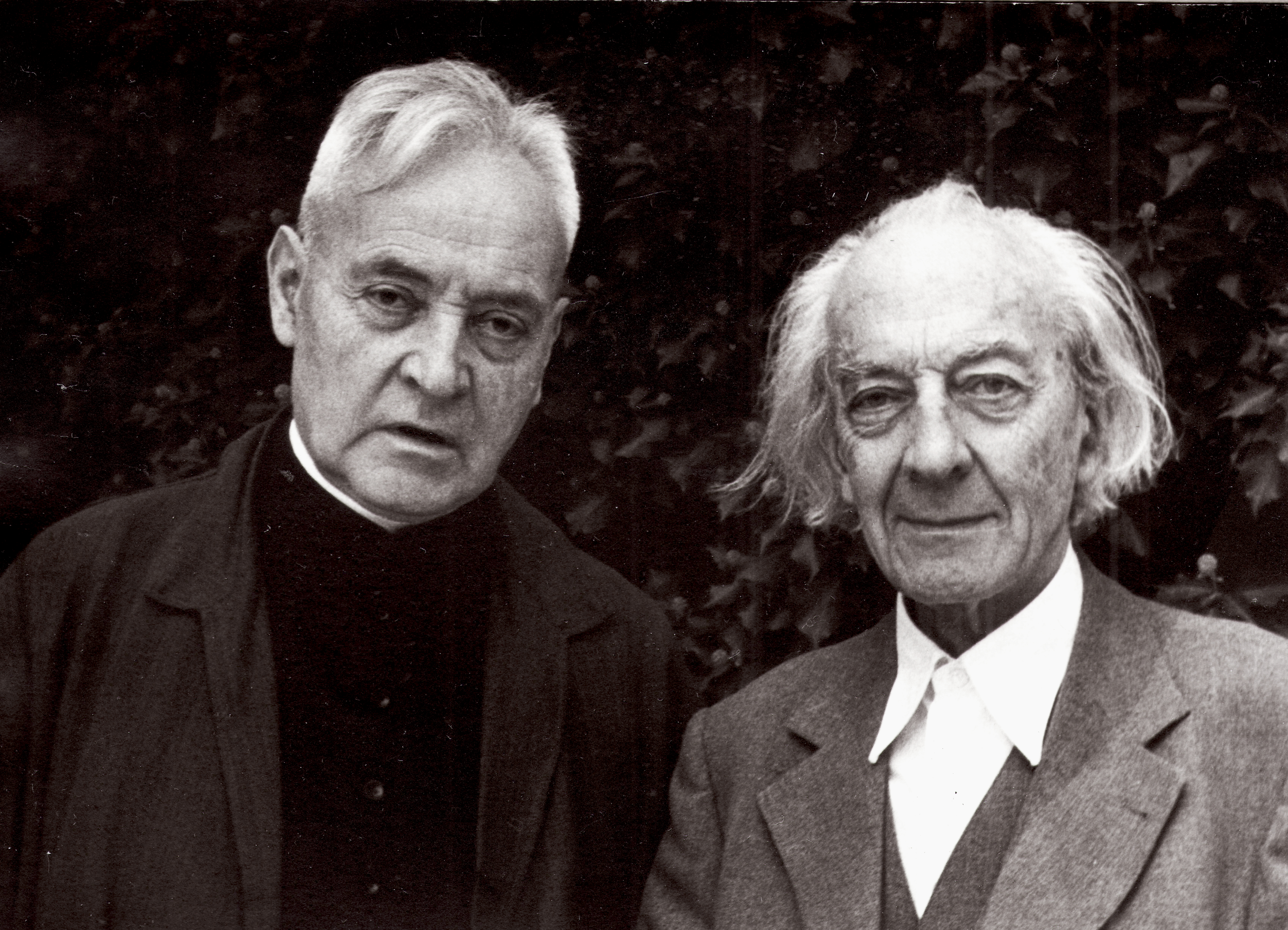 Hermann Kardinal Volk, Bischof von Mainz und Georg Volk, Offenbach; Brüder